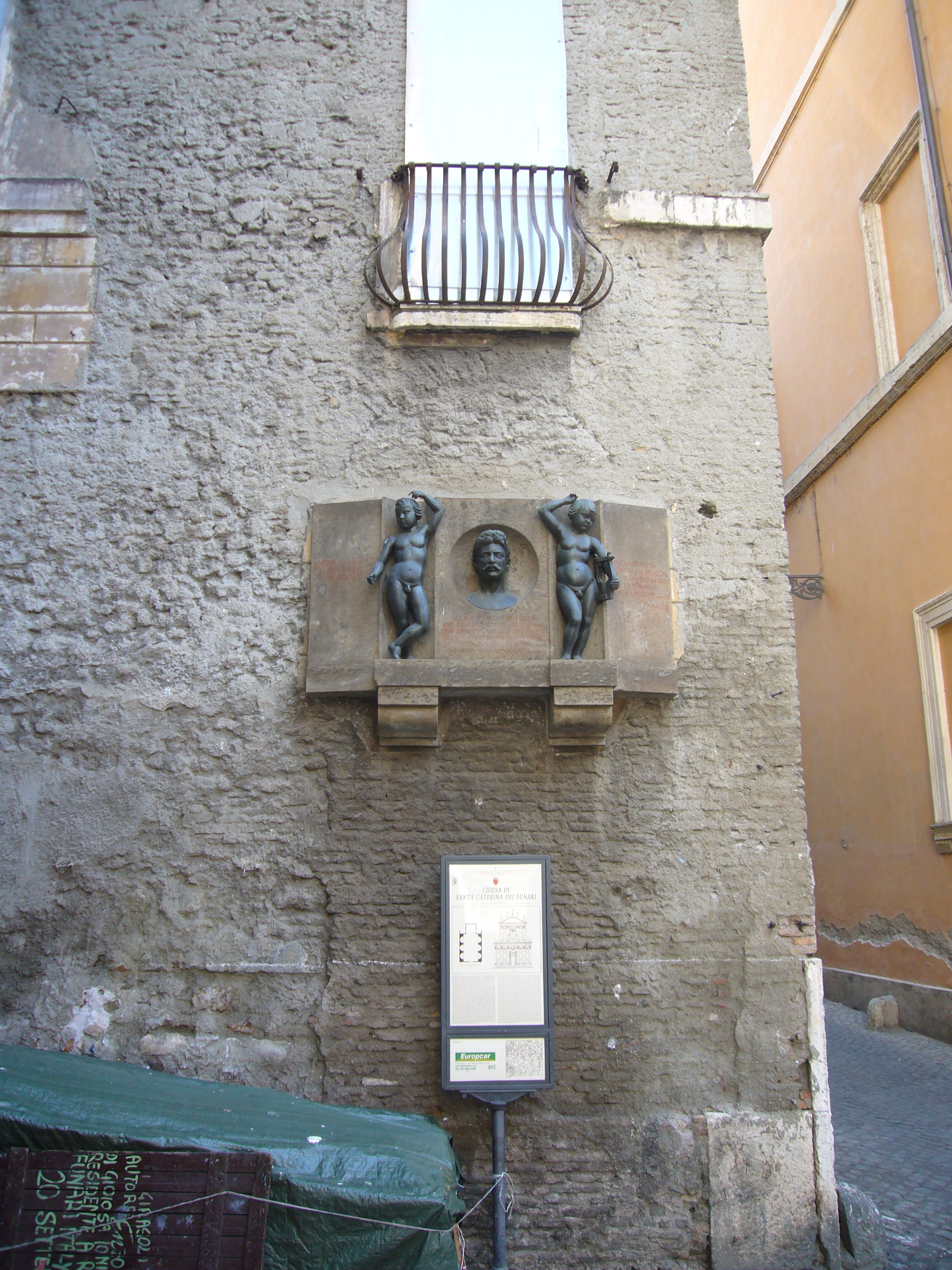 Roma, via dei Delfini: la loggetta di Zanazzo (quel che ne resta). Sotto, il suo memoriale, opera di Amleto Cataldi (1929).